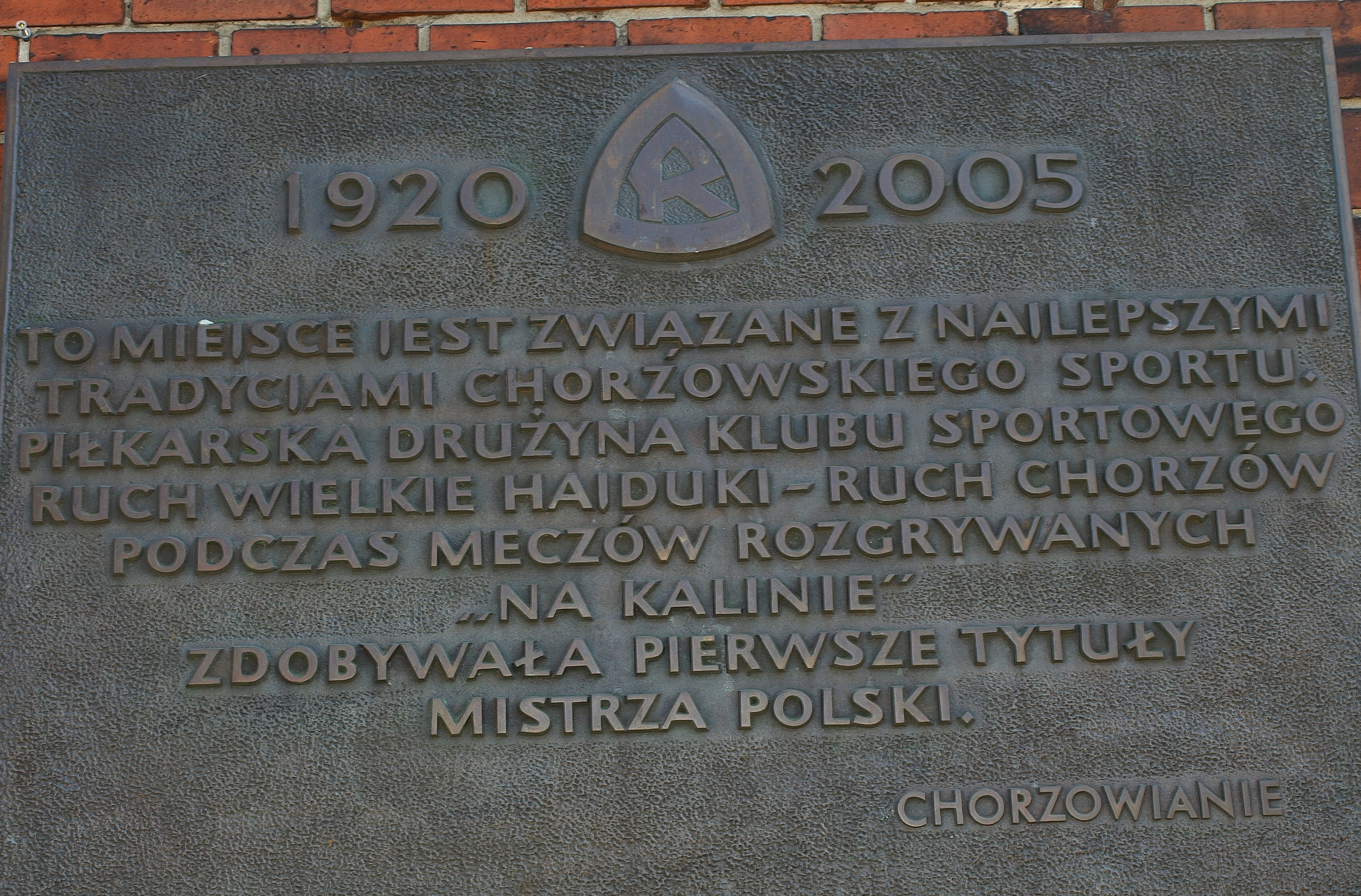 Tablica ku czci Ruchu Chorzów